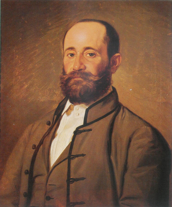 Jakov Ignjatović (1822–1889) magyarországi születésű szerb író, publicista, honvédtiszt, országgyűlési képviselő portréja. Novak Radonić (1826–1890) festménye)